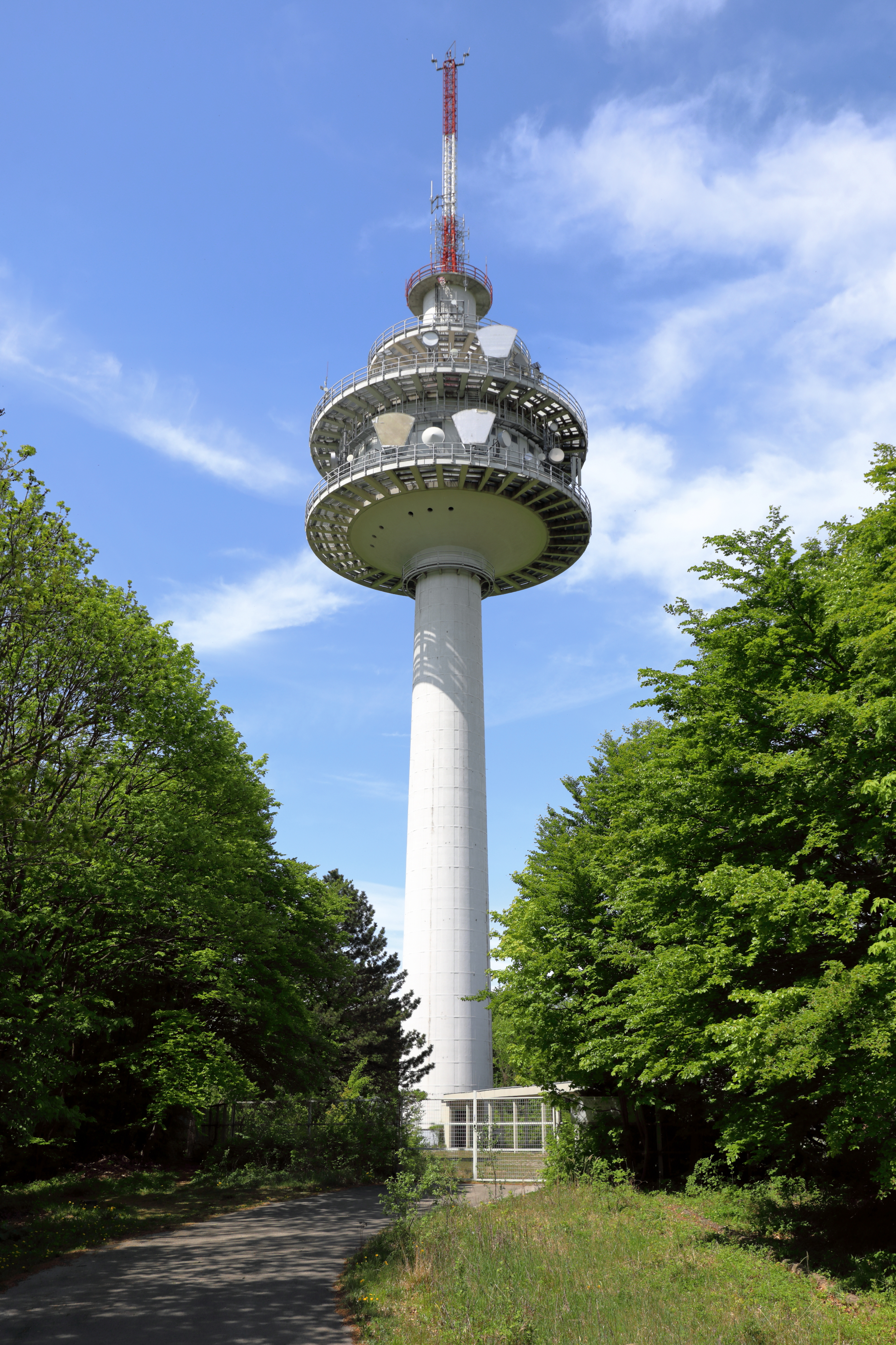 Südostansicht des Sende- und Richtfunkturmes am Exelberg in der niederösterreichischen Stadtgemeinde Klosterneuburg.Der 109m hohe Turm ist baugleich mit dem Richtfunkturm Ansfelden und Roßbrand und ging 1979 in Betrieb.